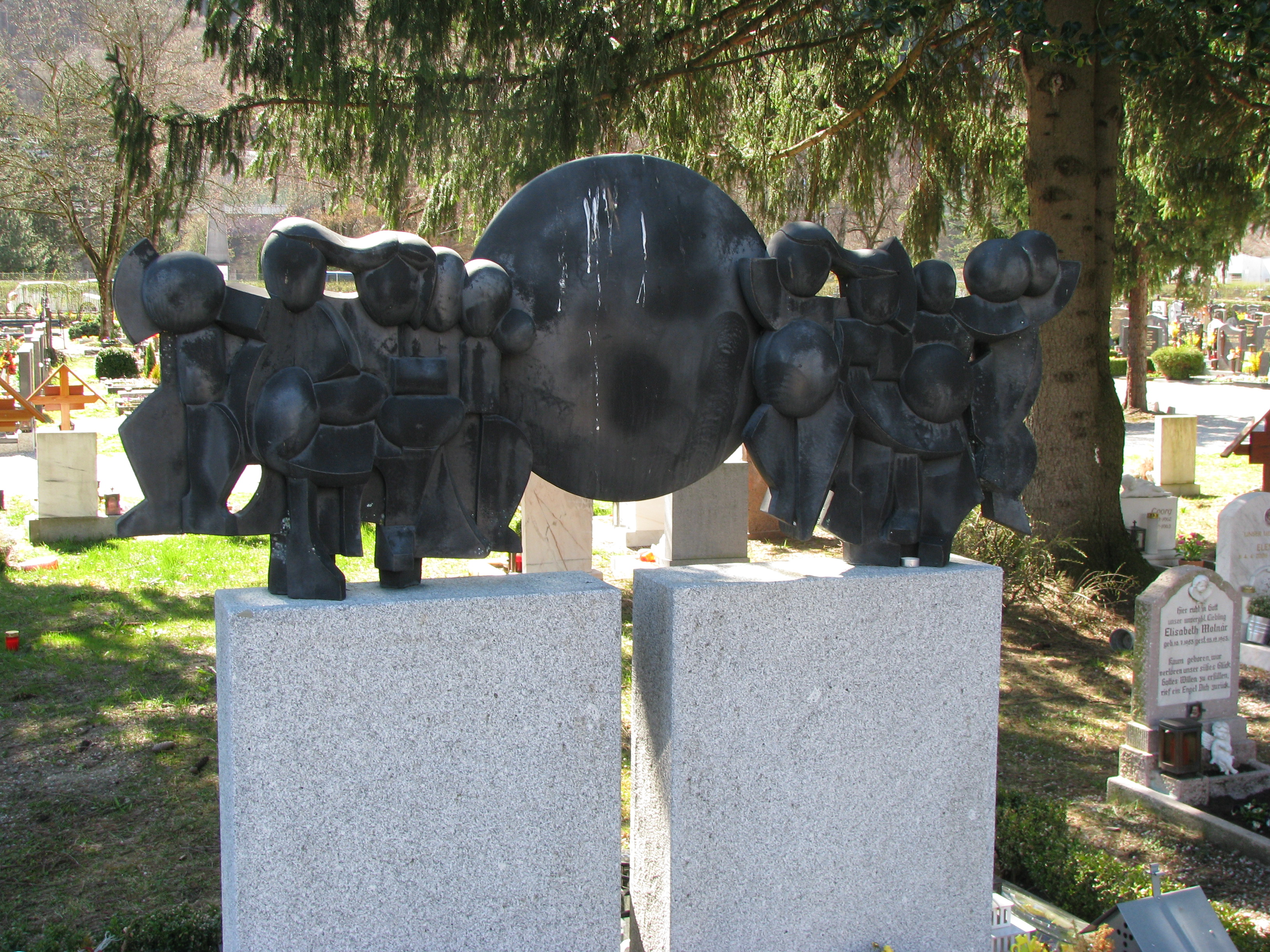 Ostfriedhof (Pradler Friedhof), Innsbruck: Denkmal von Georg Loewit am Kinderfeld